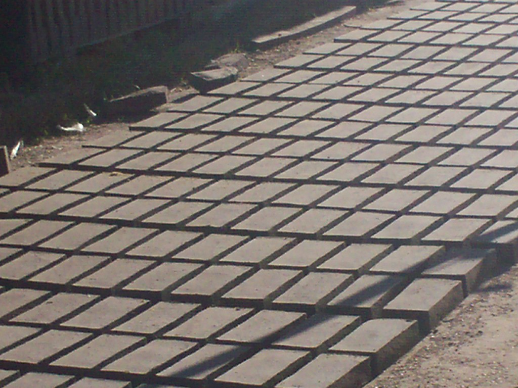 Ladrillos aún no quemados, apilados en un galpón